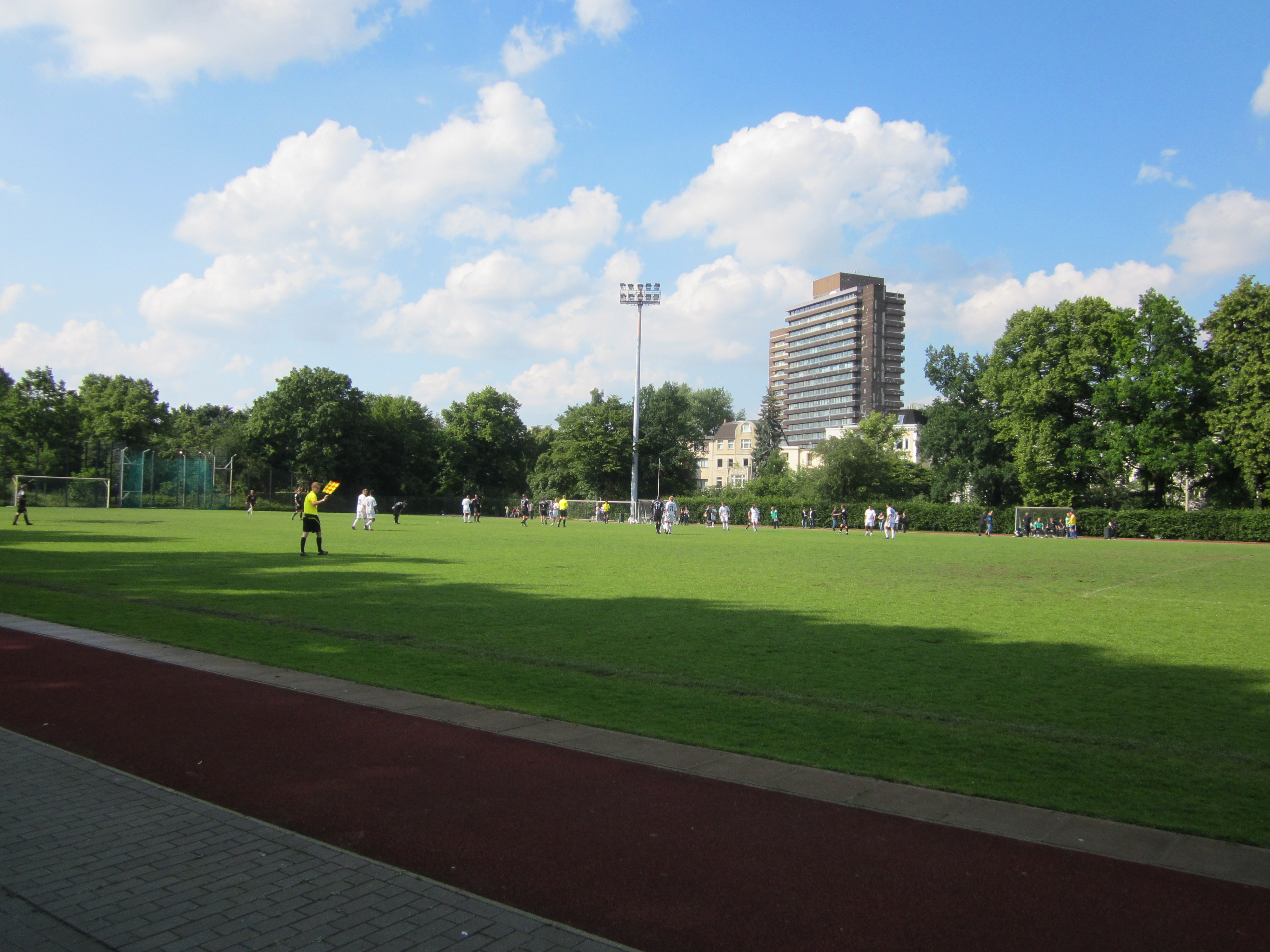 Sportplatz des SV Polizei Hamburg im Sternschanzenpark im Hamburger Stadtteil Sternschanze.